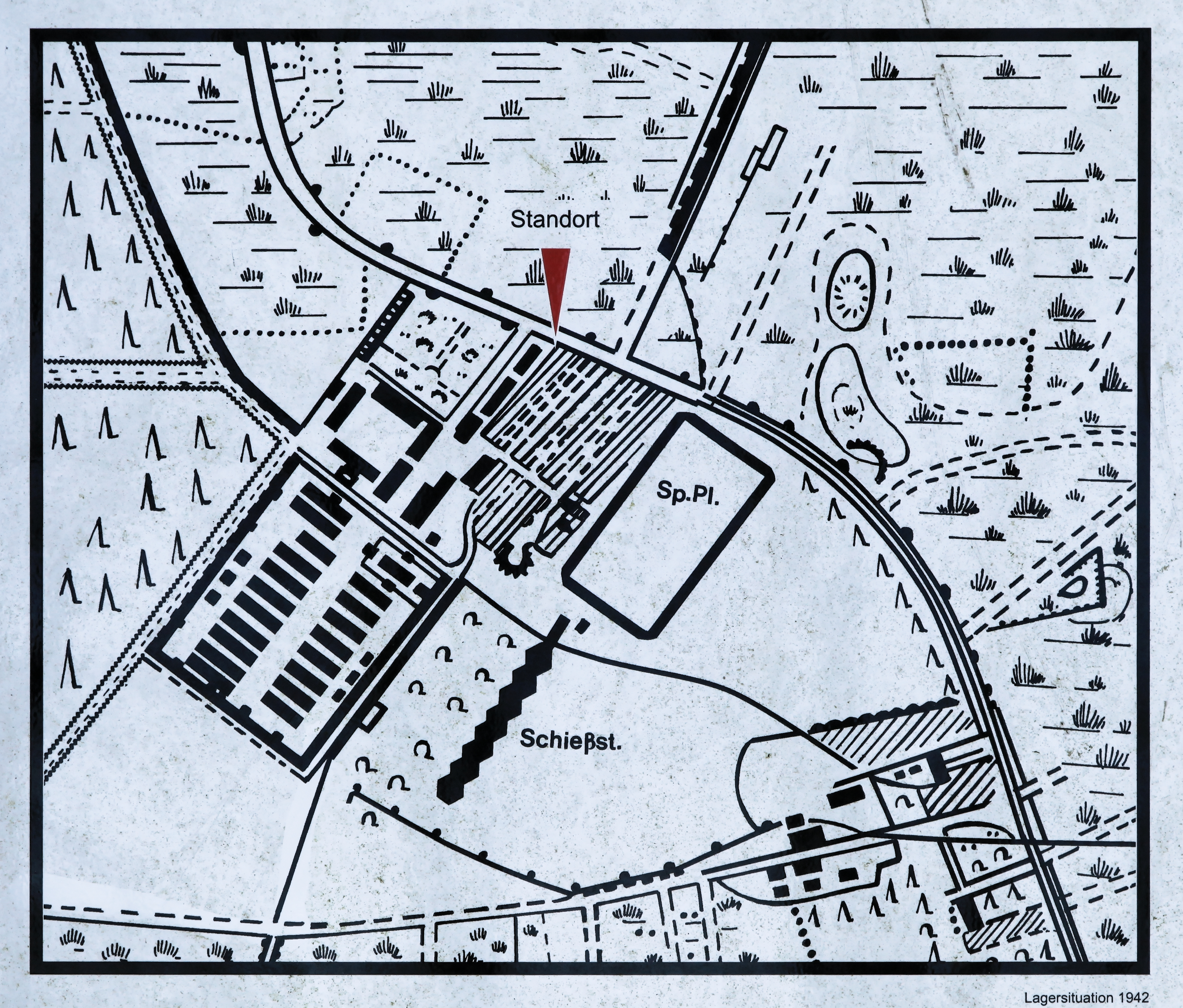 Ehemaliges Emslandlager Aschendorfermoor, Oldenburger Straße in Papenburg